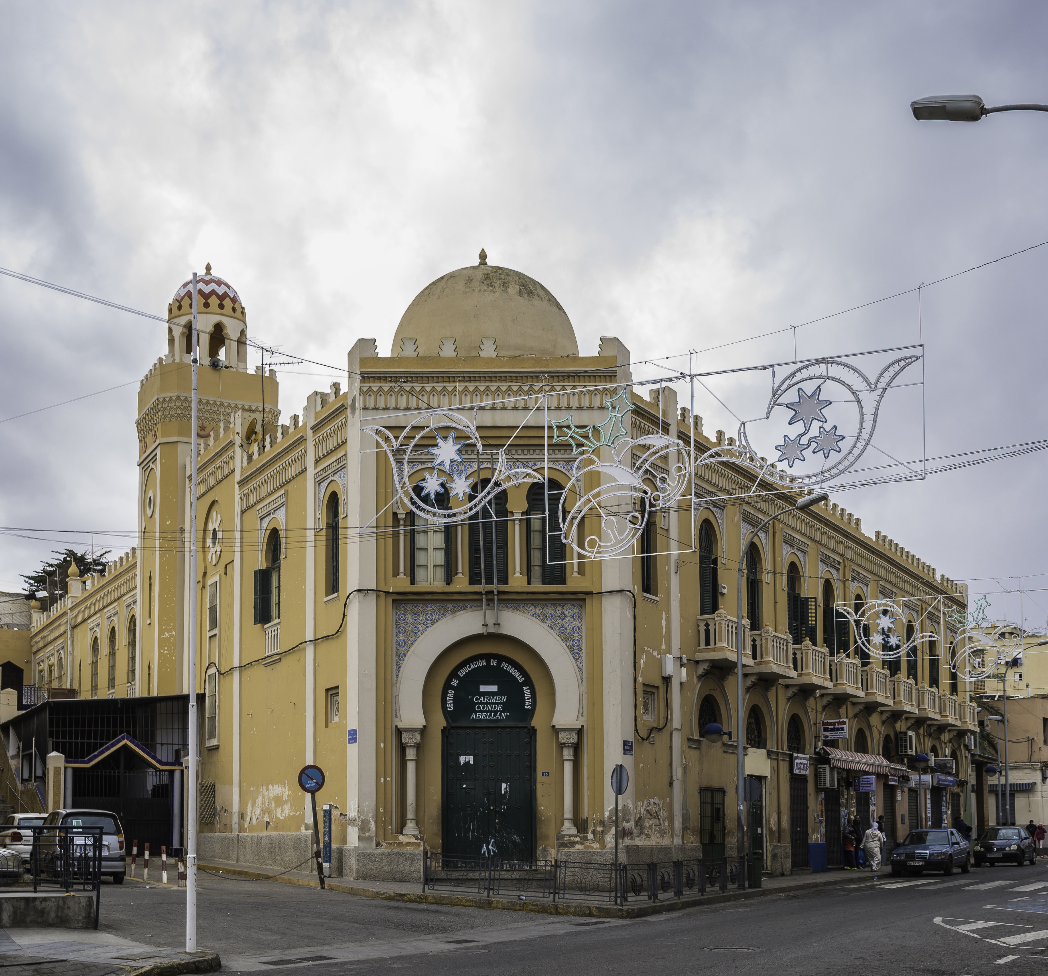 Mezquita central de Melilla (España). Enrique Nieto y Nieto (1945).